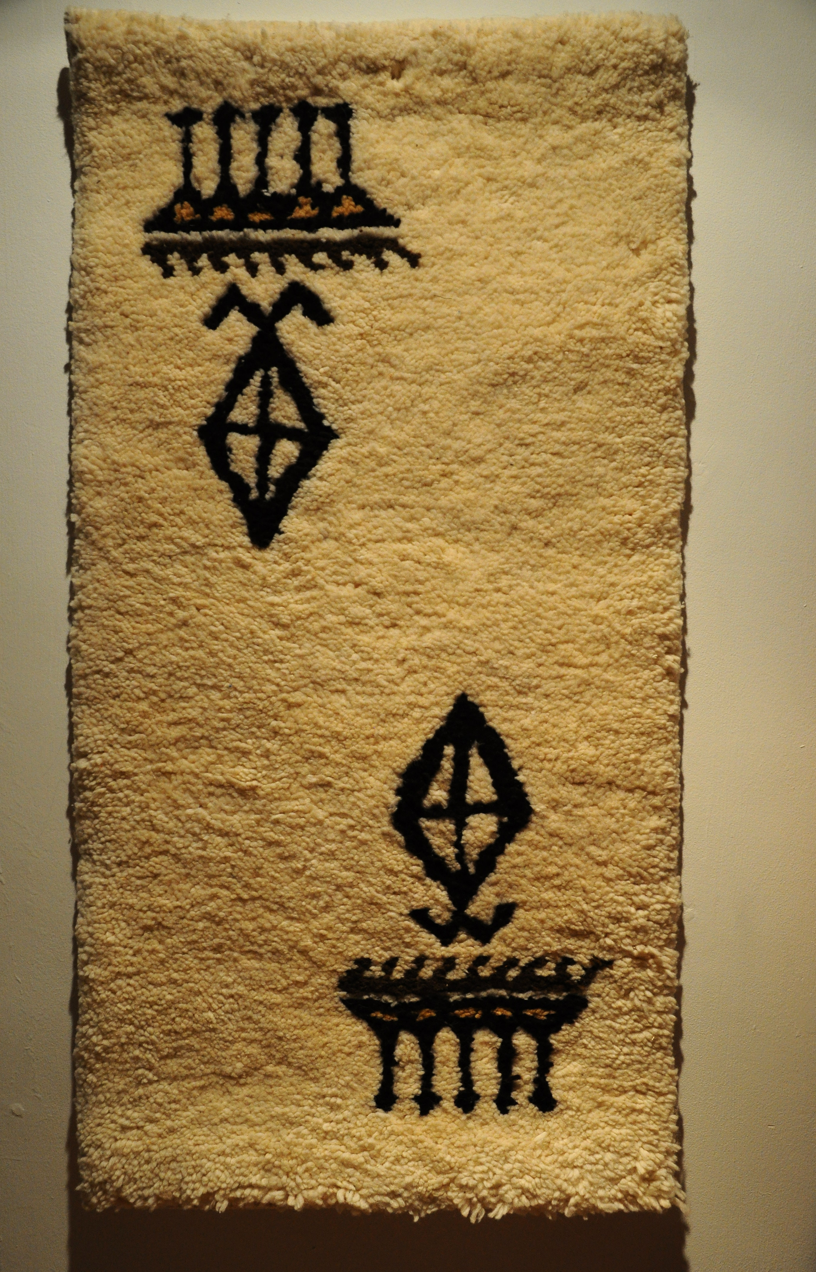 Tapis berbère acheté à Kairouan (Tunisie)